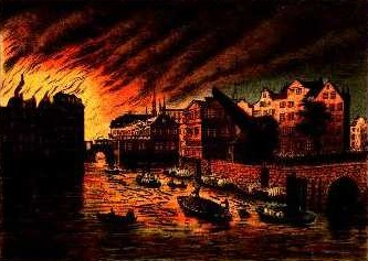 Der Hamburger Brand von 1842 bei der Zollenbrücke. Kolorierte Lithographie von Peter Suhr (1788-1857). This is a photograph of an architectural monument.